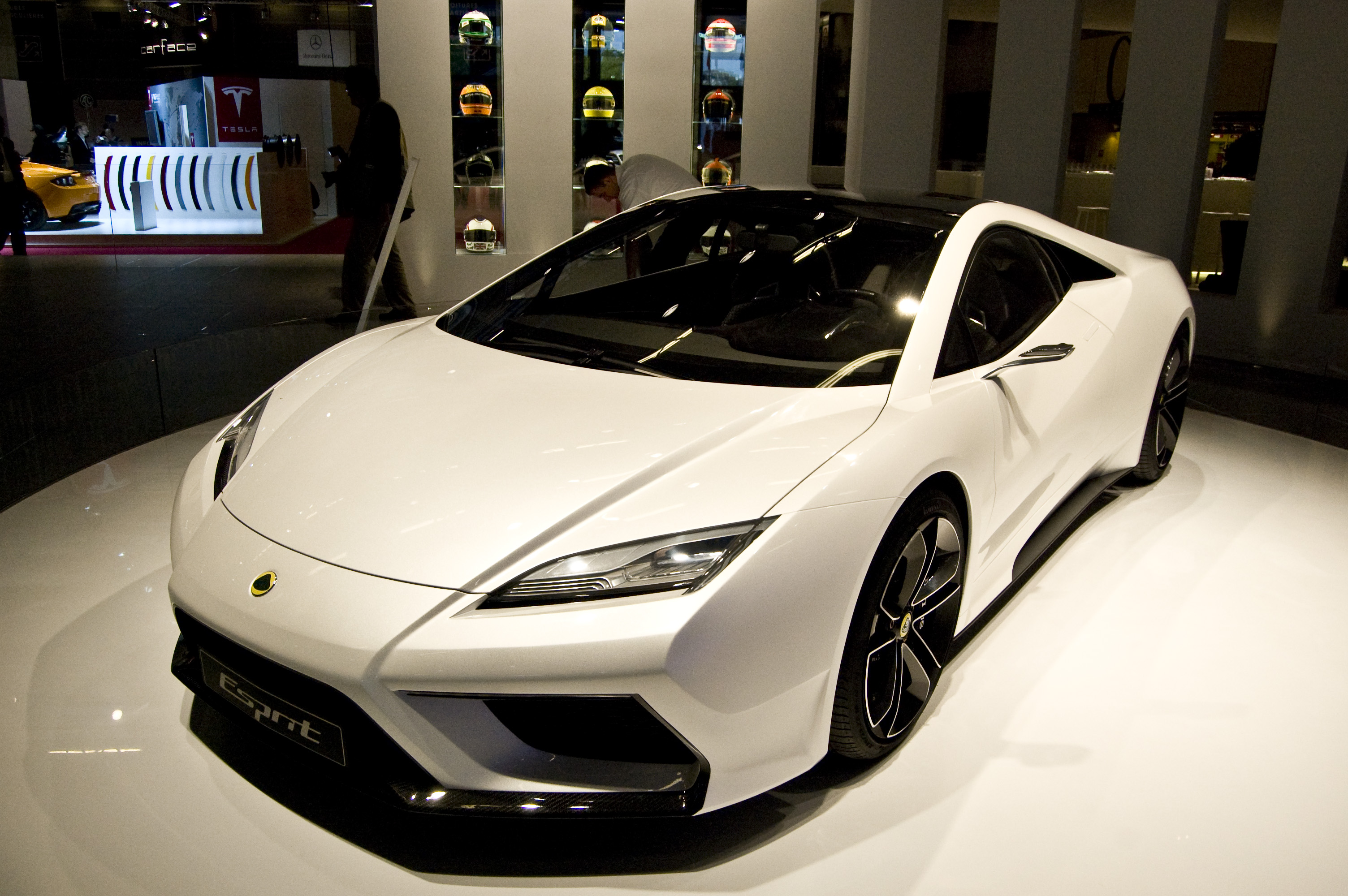 Lotus Esprit Concept en el Salón de París 2010